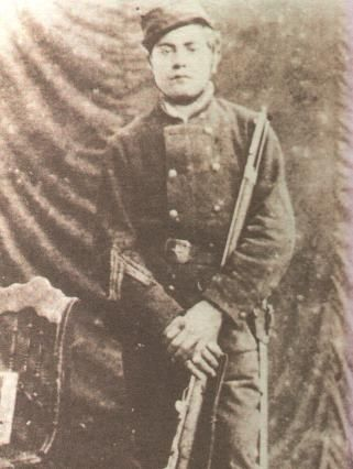 Luis Cruz Martínez (Villa de Molina, Chile; 5 de agosto de 1866 - † Concepción, Perú; 10 de julio de 1882) militar chileno, subteniente de la 4° compañía del Regimiento Reforzado Nº 7 Chacabuco y héroe del combate de Concepción.